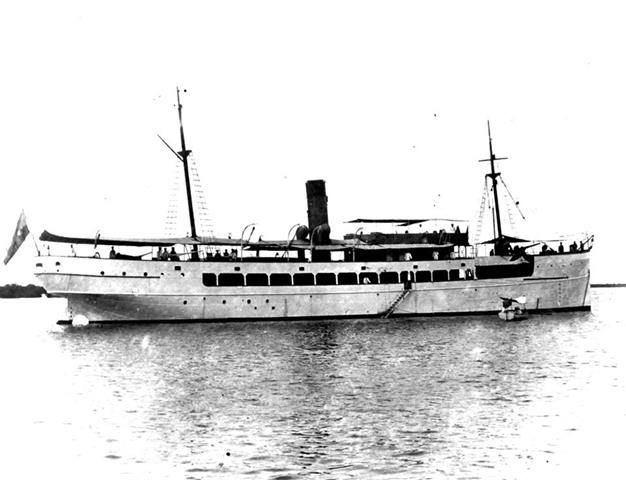 Buque de transporte zamora de la marina venezolana en 1903